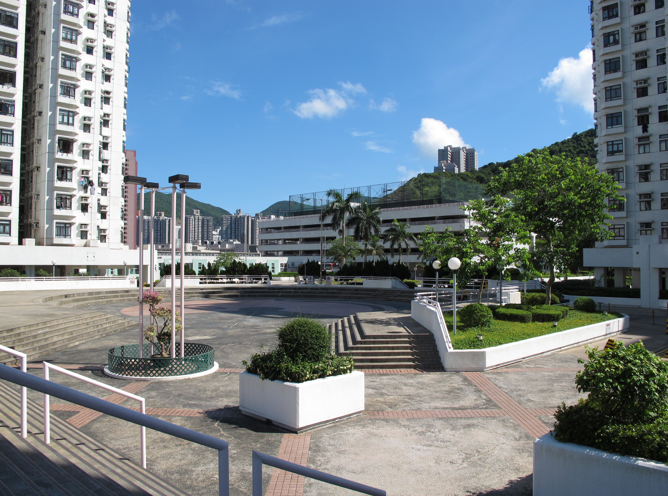 Heng Fa Chuen Podium 杏花邨